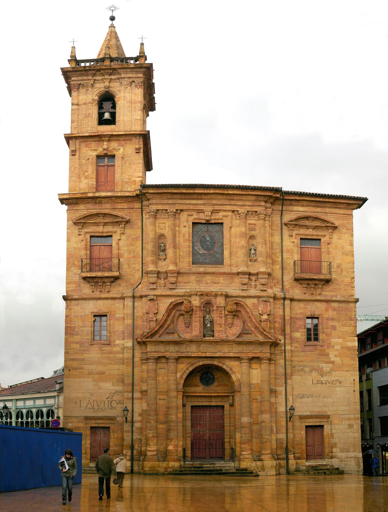 Iglesia de San Isidoro el Real, Oviedo